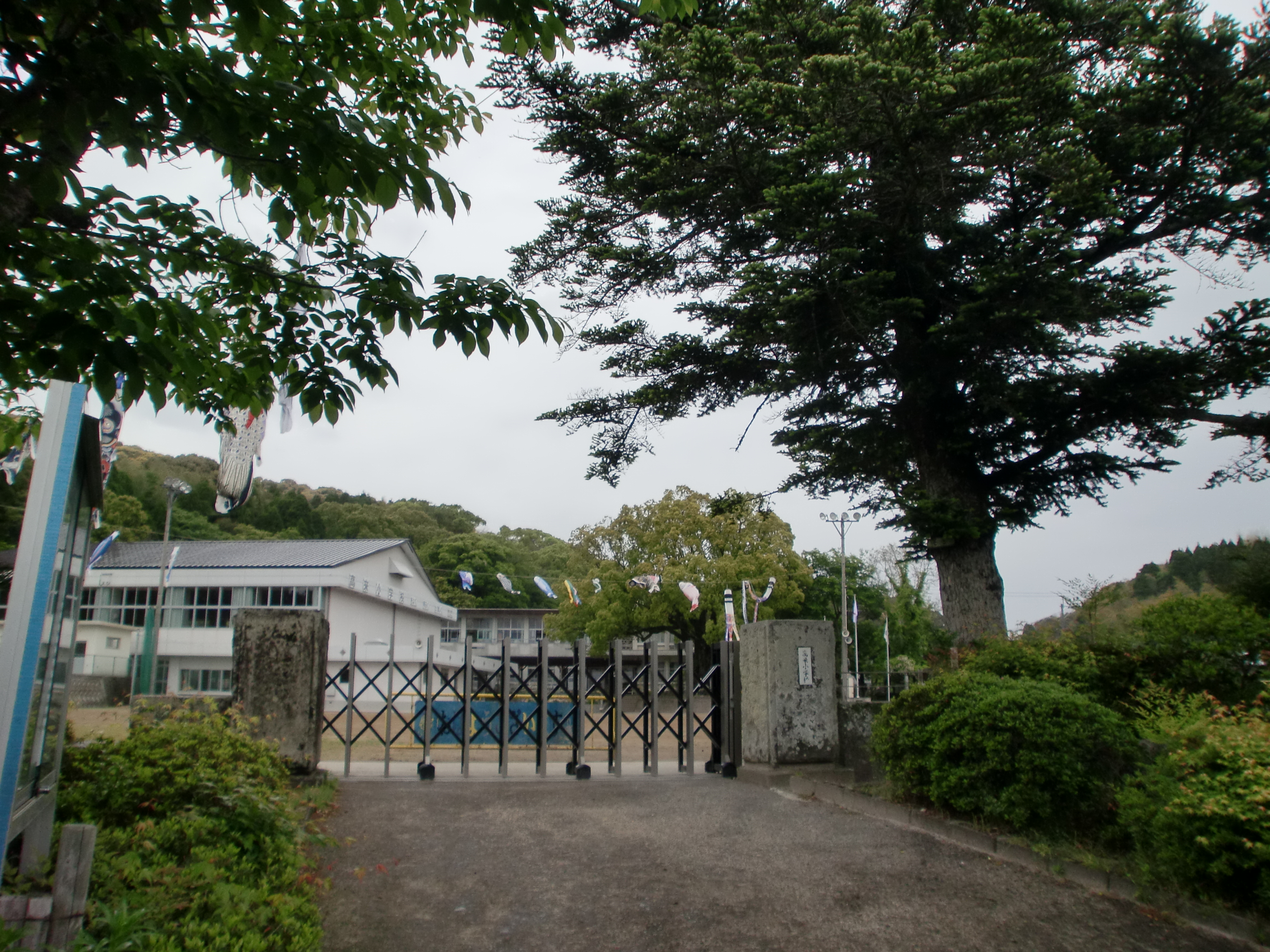 薩摩川内市立高来小学校の外観。